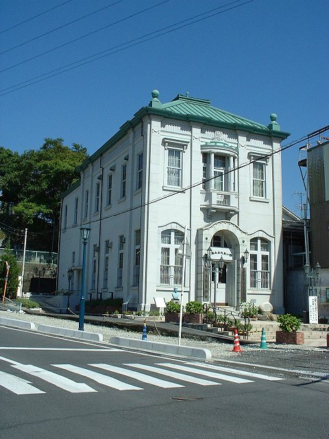 旧周防銀行本店（山口県柳井市） 明治40年（1907年）建造